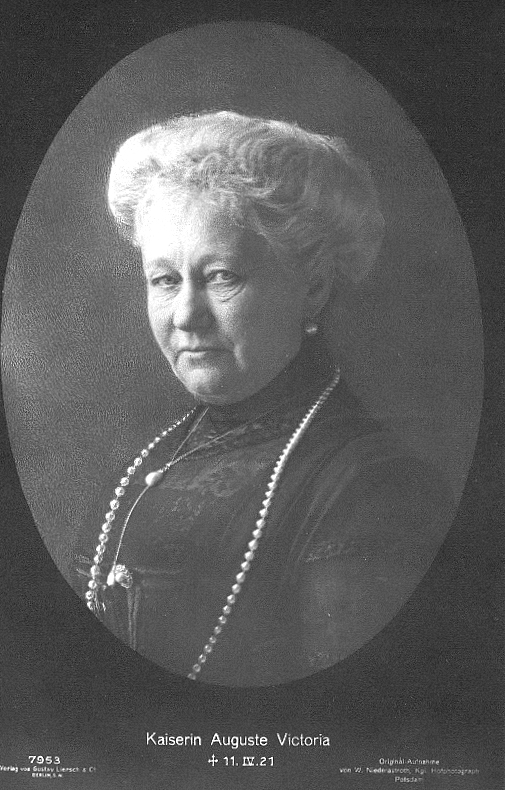 Auguste-Victoria im Exil, Ansichtskarte aus der Zeit nach ihrem Tod Objekt und Scan: Slg. Alexander Buschorn 23:46, 31. Okt 2004 Axb 505 x 790 (275993 Byte) (Auguste-Victoria im Exil)